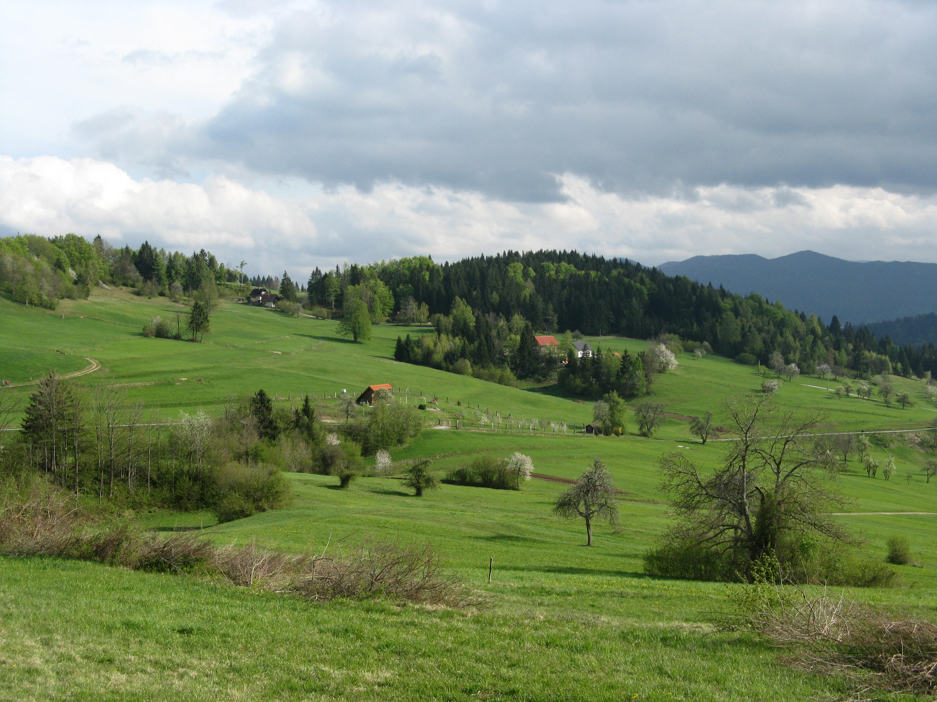 Poljanski pašniki nad Velikim Poljanam